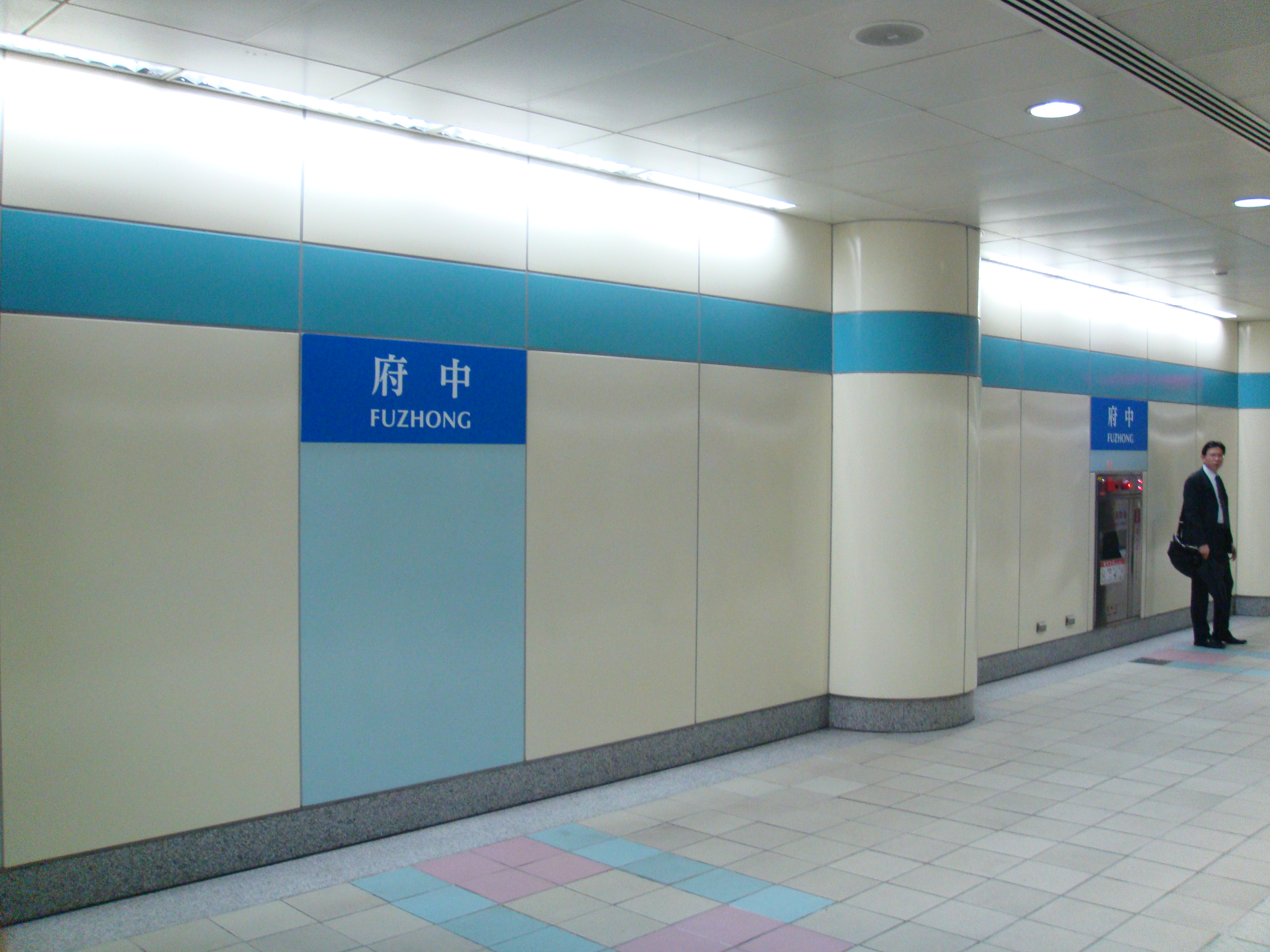 Fuzhong Station, Banqiao Line, Taipei Metro, Taiwan.